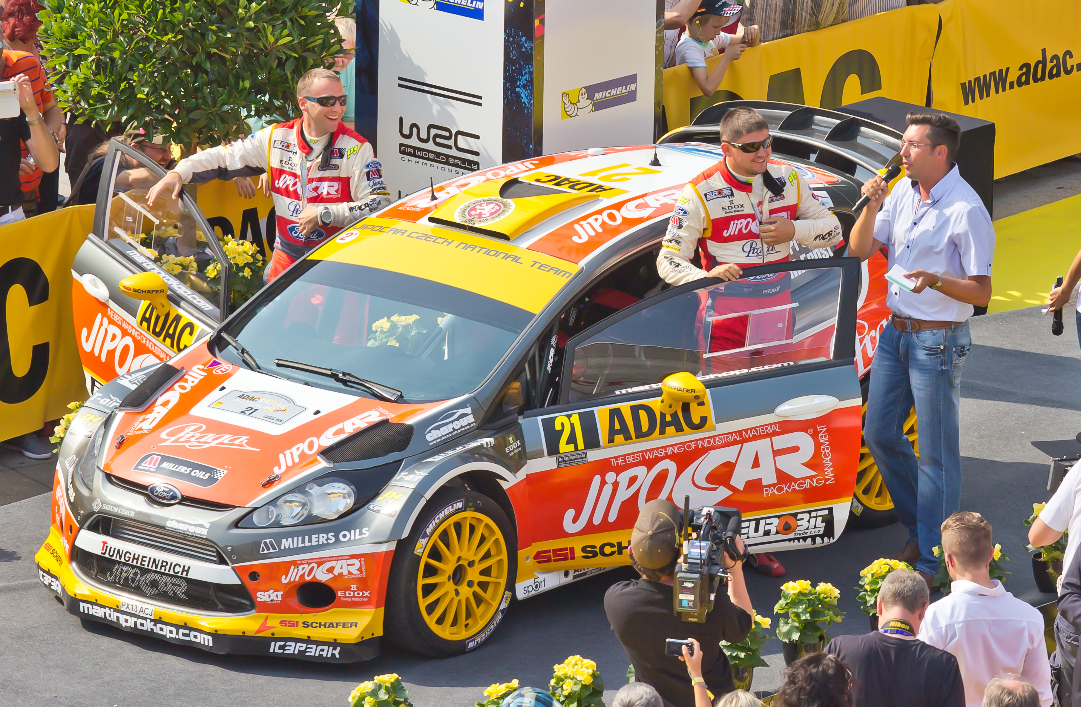 ADAC Rallye Deutschland 2013 - Fahrerpräsentation auf dem Roncalliplatz. Martin Prokop mit Co-Fahrer Michal Ernst für das Jipocar Czech National Team im Ford Fiesta RS WRC. Startnummer 21